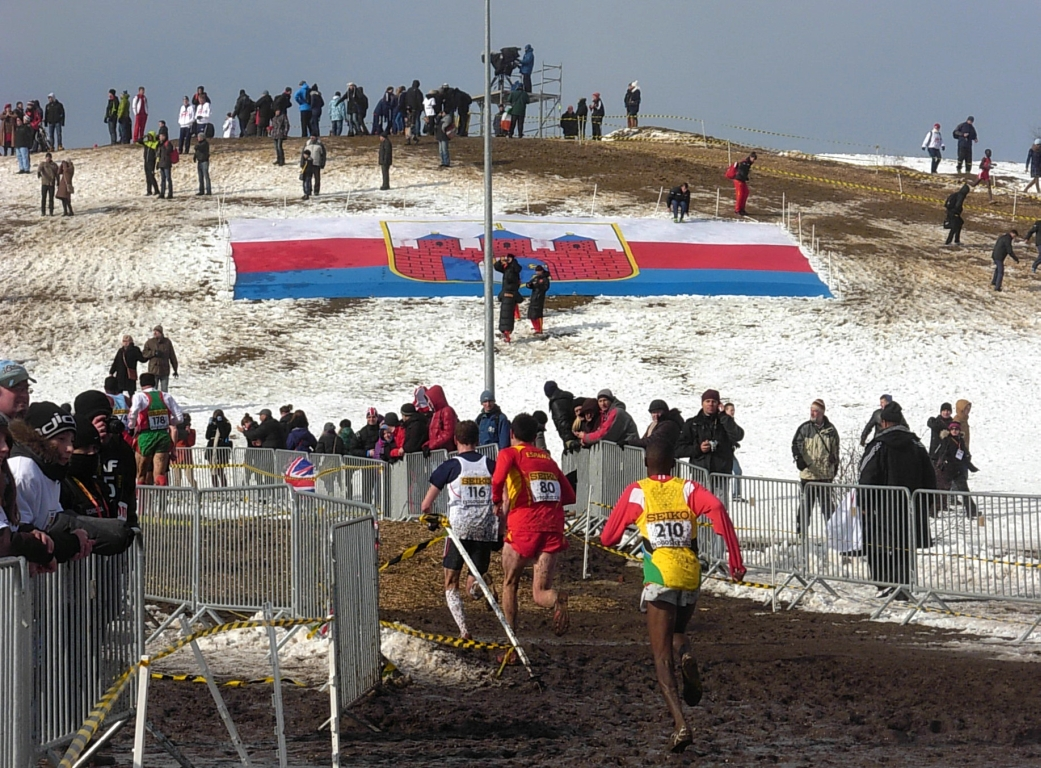 Mistrzostwa Świata w Biegach Przełajowych IAFF 2013 w Leśnym Parku Kultury i Wypoczynku Myślęcinek w Bydgoszczy